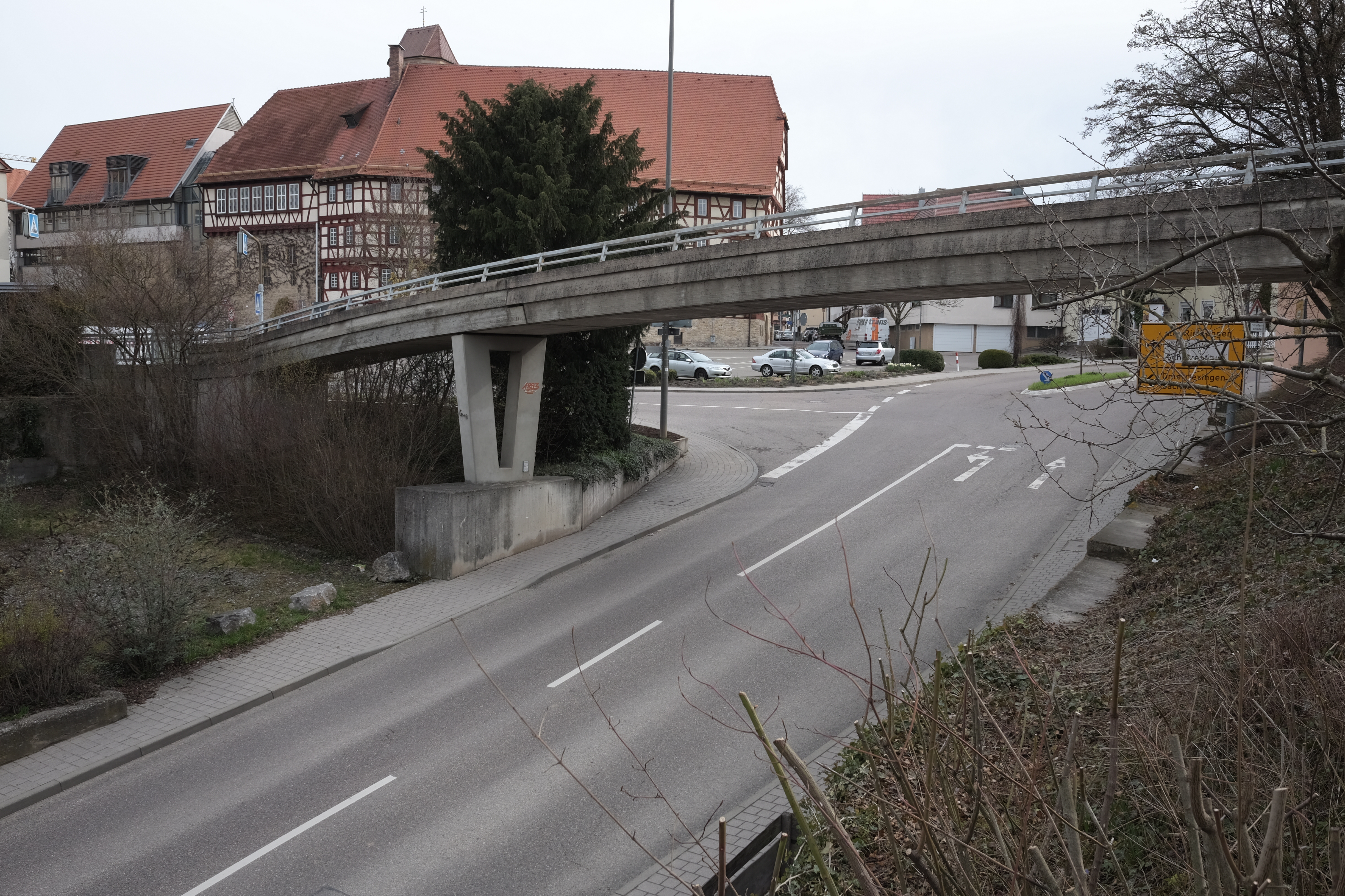 Die Fußgängerbrücke über die Vaihinger Straße in Markgröningen.